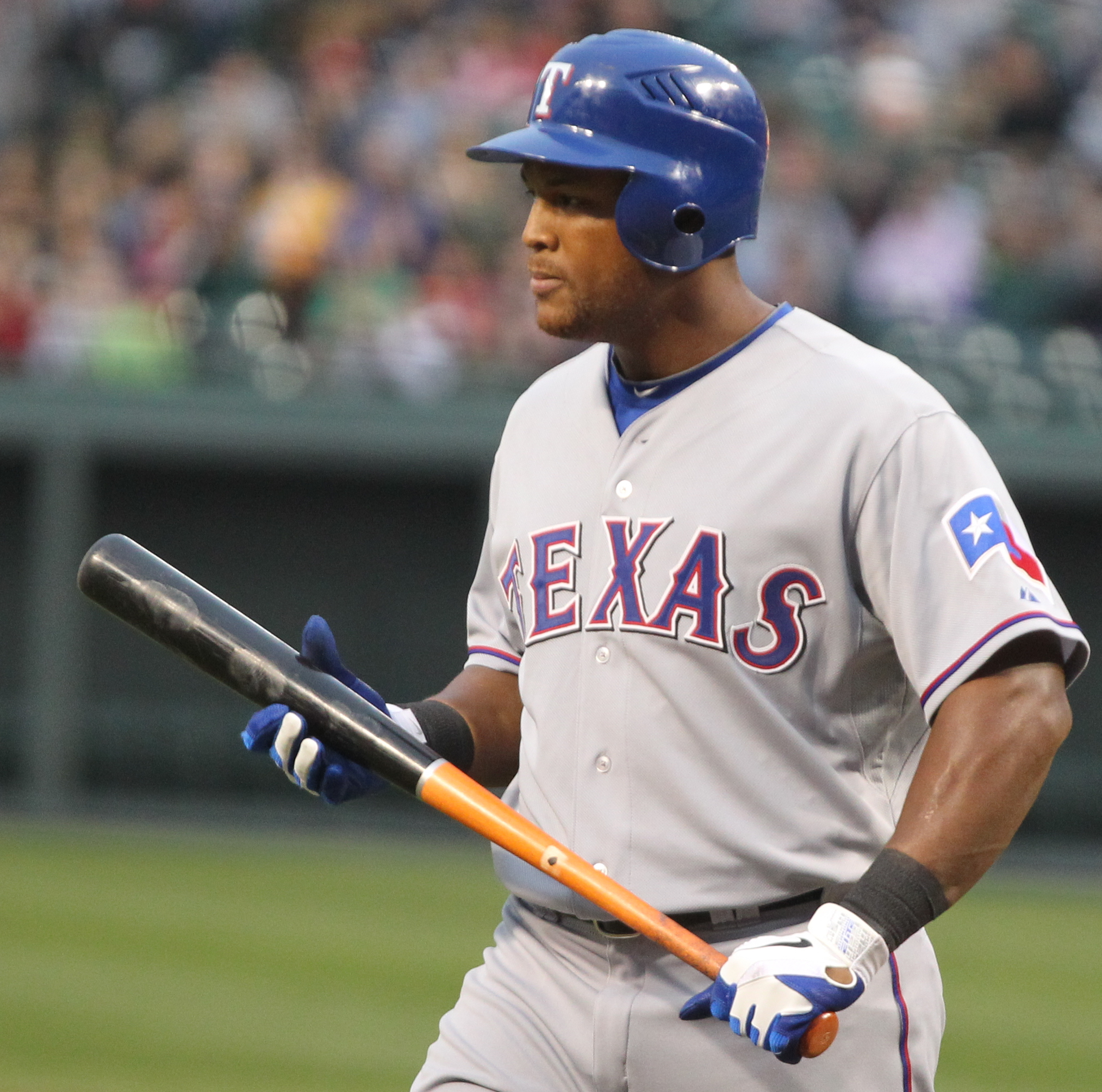 Adrián Beltré